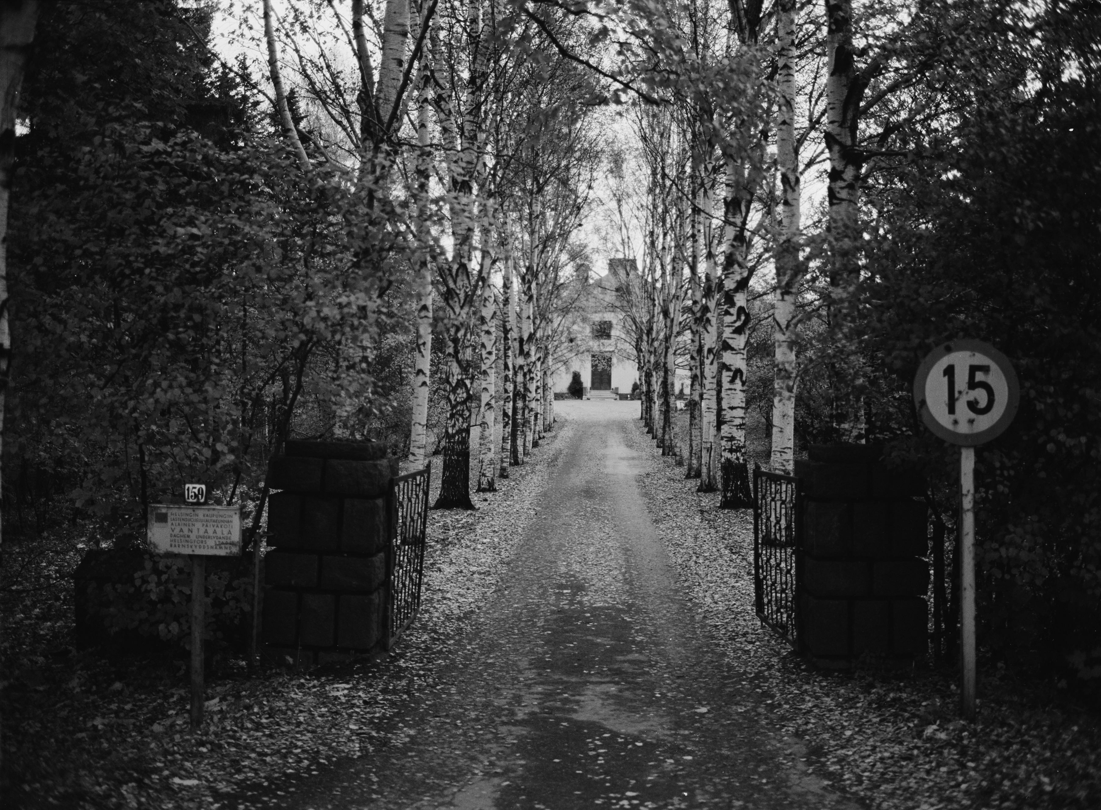 Villa Arabeski koivukujan päässä Helsingissä osoitteessa Hämeentie 159. Kuva on otettu 12.10.1983, jolloin rakennuksessa toimi Helsingin kaupungin päivähoitoyksikkö Vantaala.